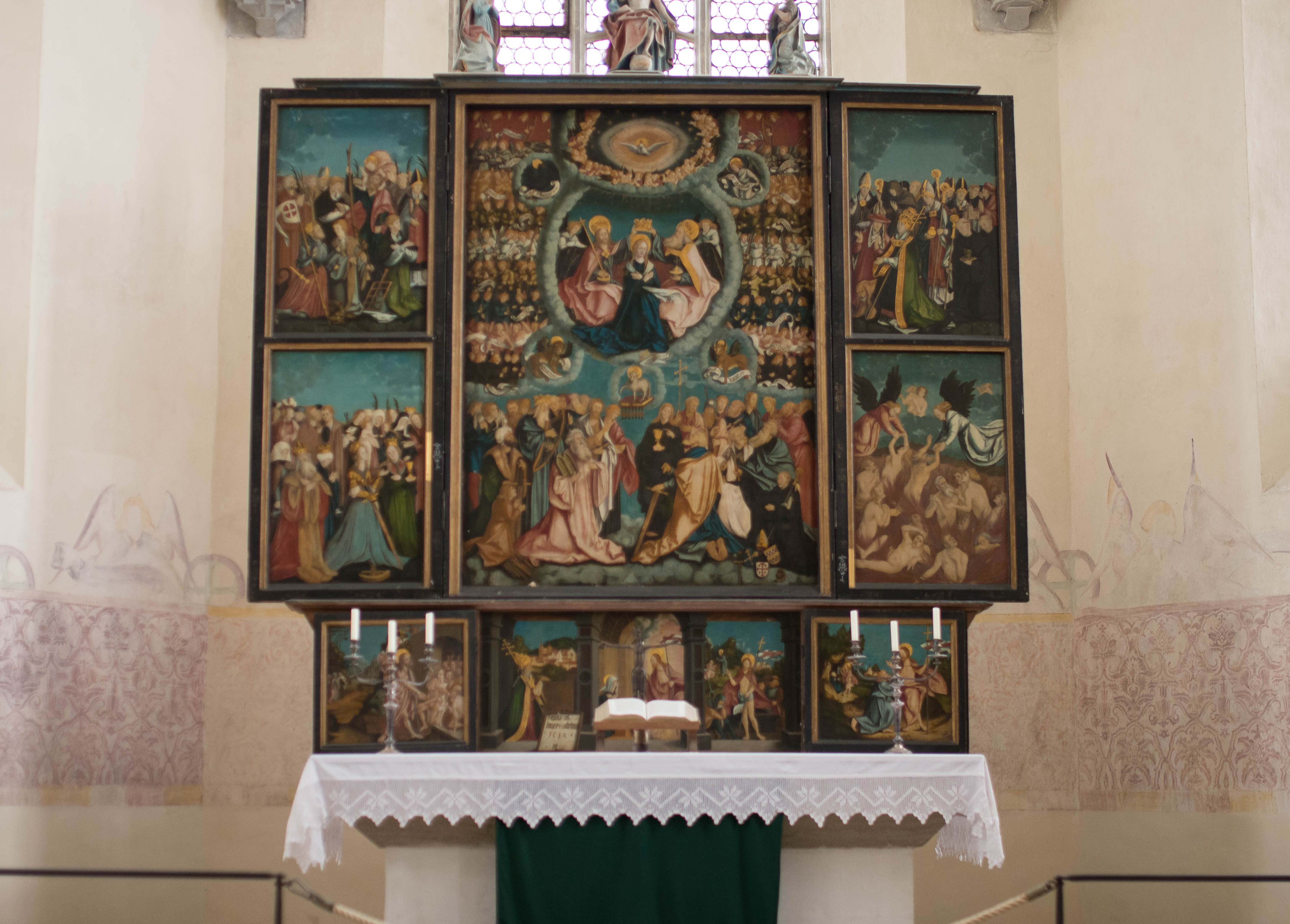 Klosterkirche Auhausen (Bayern), Interieur, FlügelaltarThis is a photograph of an architectural monument. 117-12